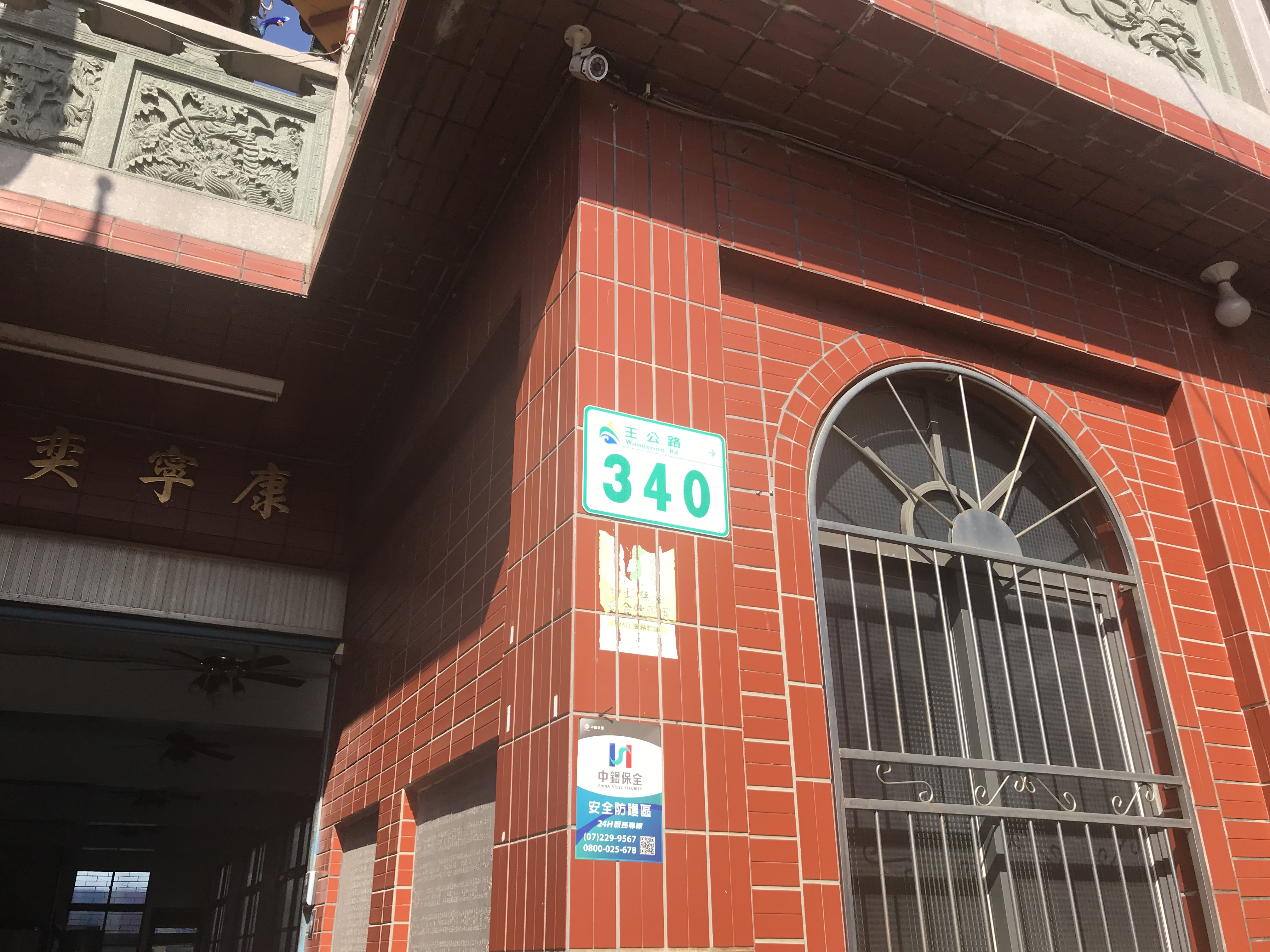 廣應廟門牌